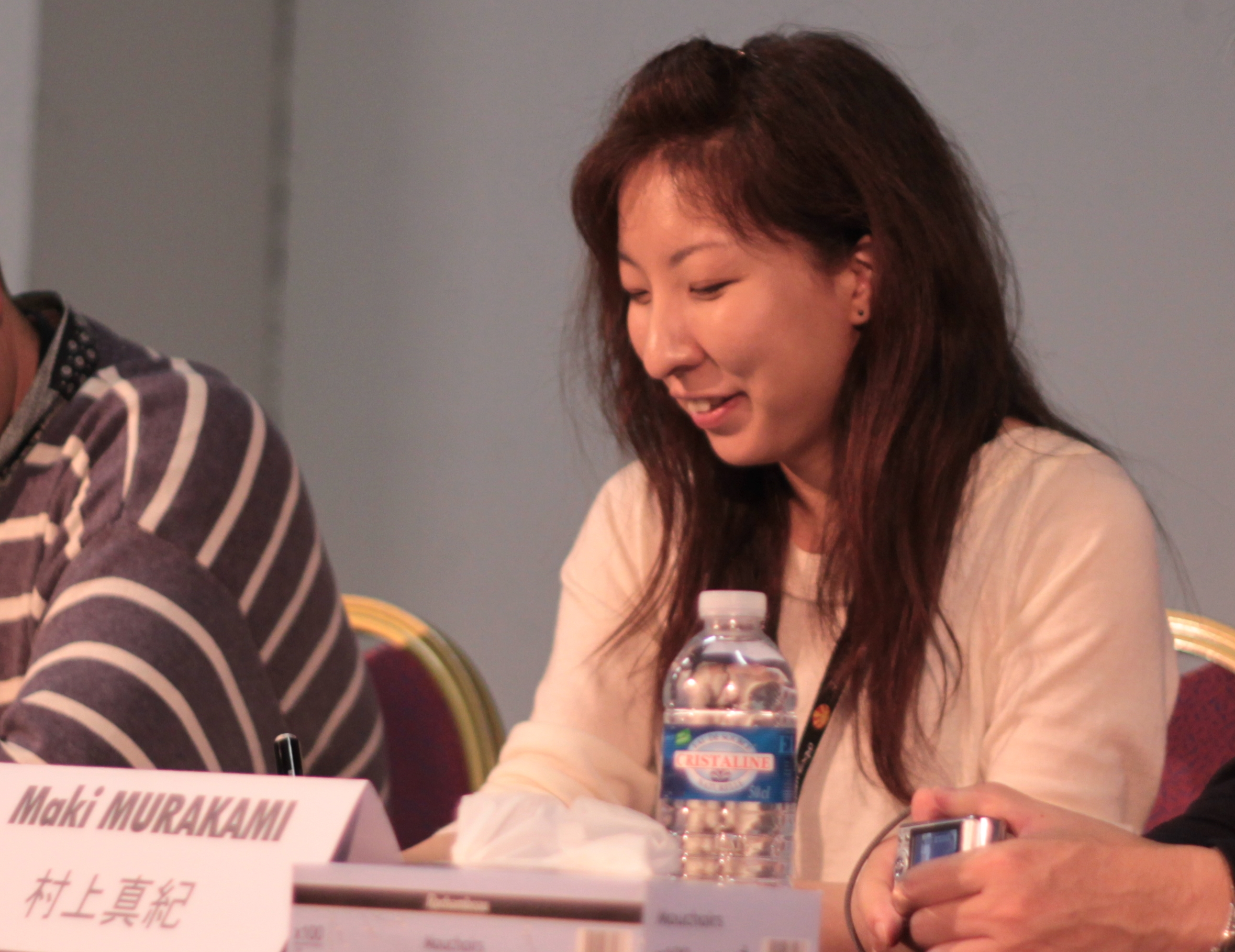 La mangaka Maki Murakami en dédicace. Chibi Japan Expo 2010.